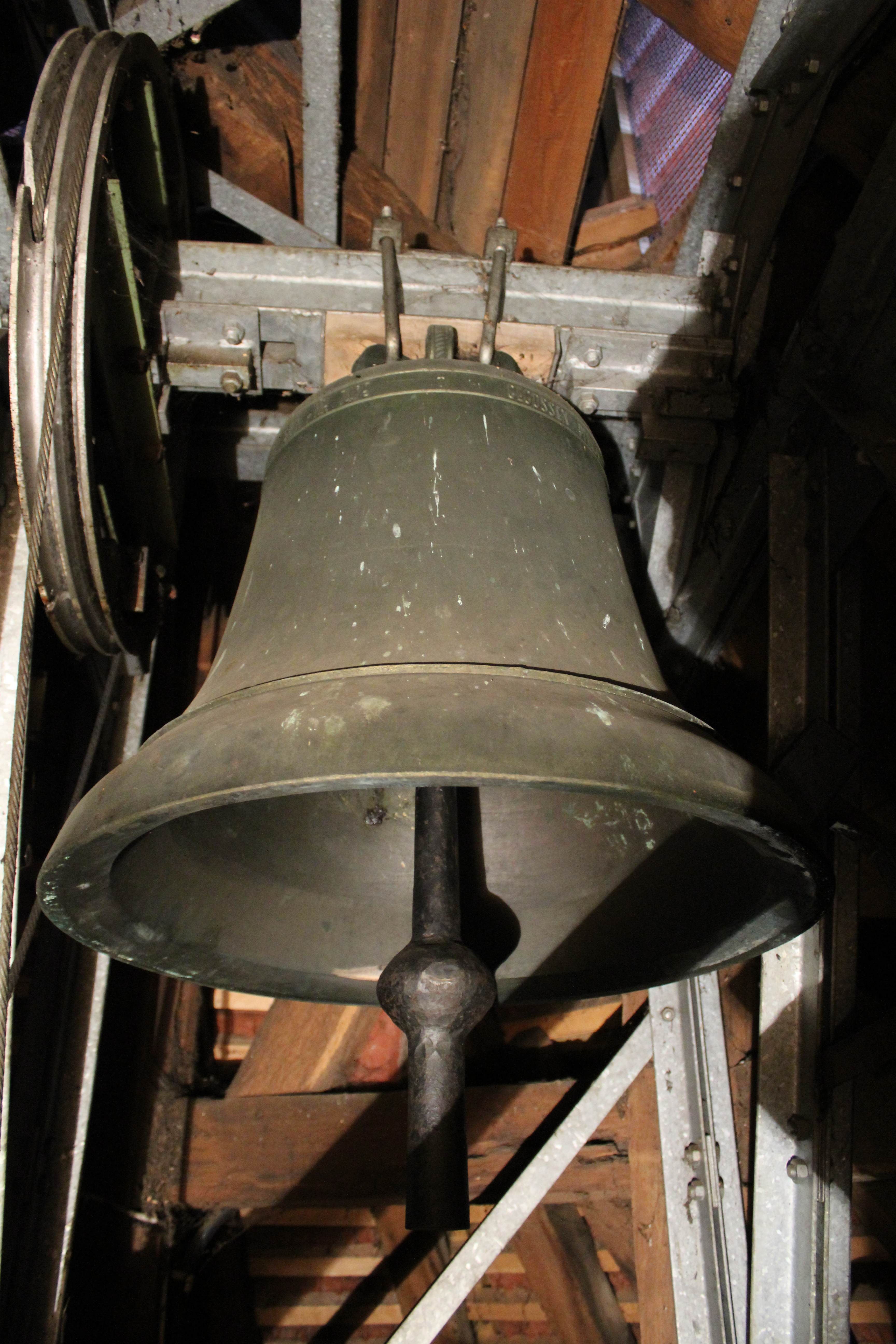 Evangelische Kirche Ruppertenrod, Mücke, Vogelsbergkreis, Hessen, Deutschland